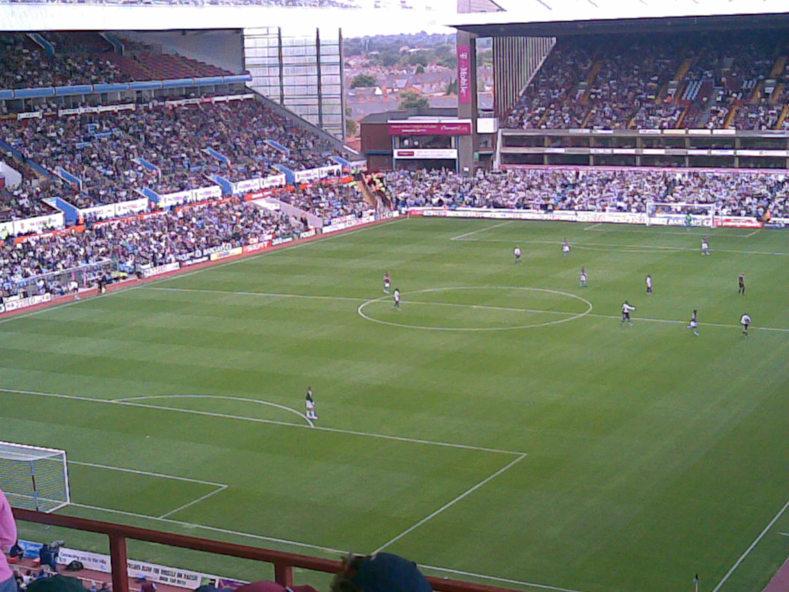 Villa Park stadium, Birmingham